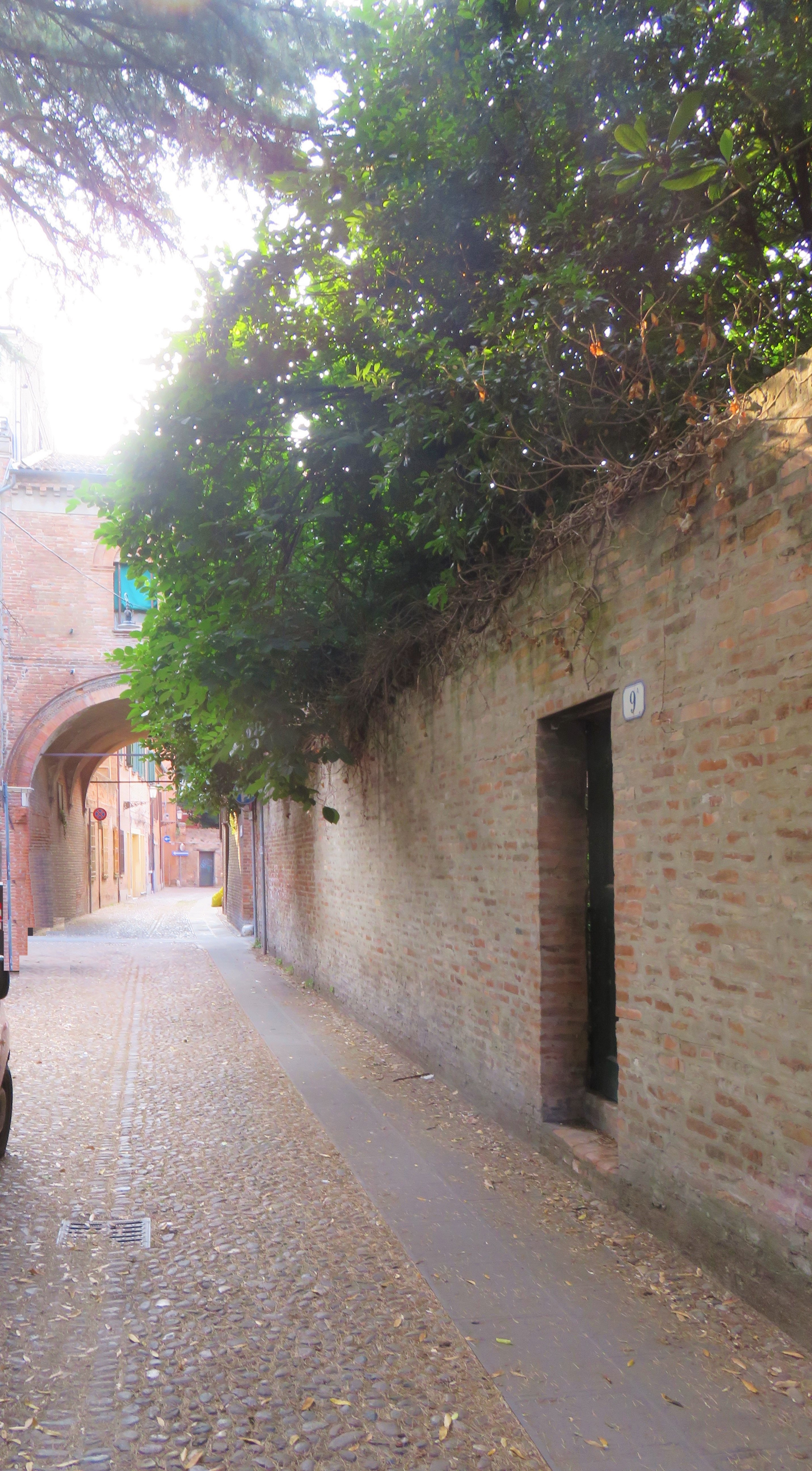 Via Coperta, un tempo faceva parte di Via delle Volte. Appartiene al nucleo medievale della città estense